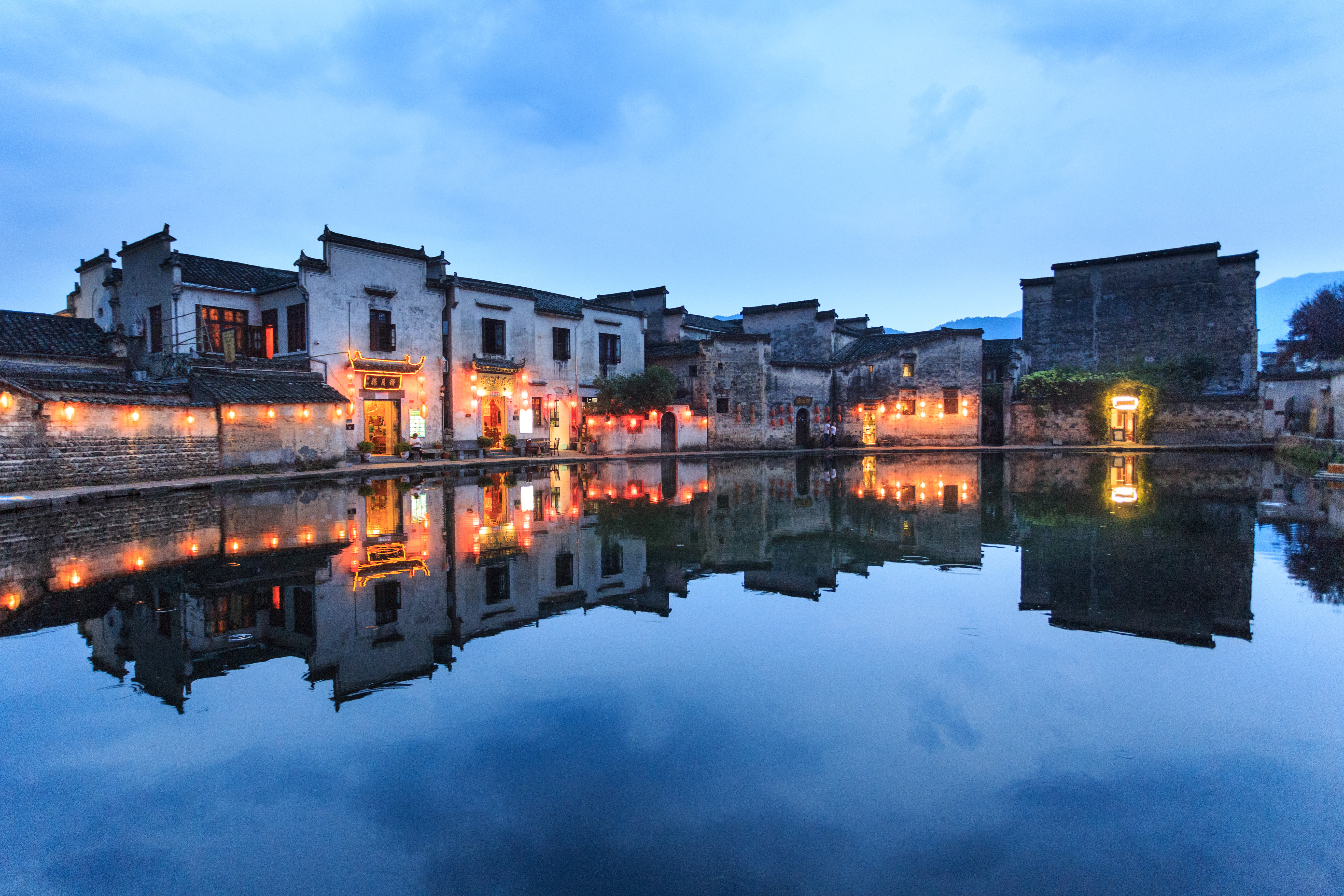 宏村月沼